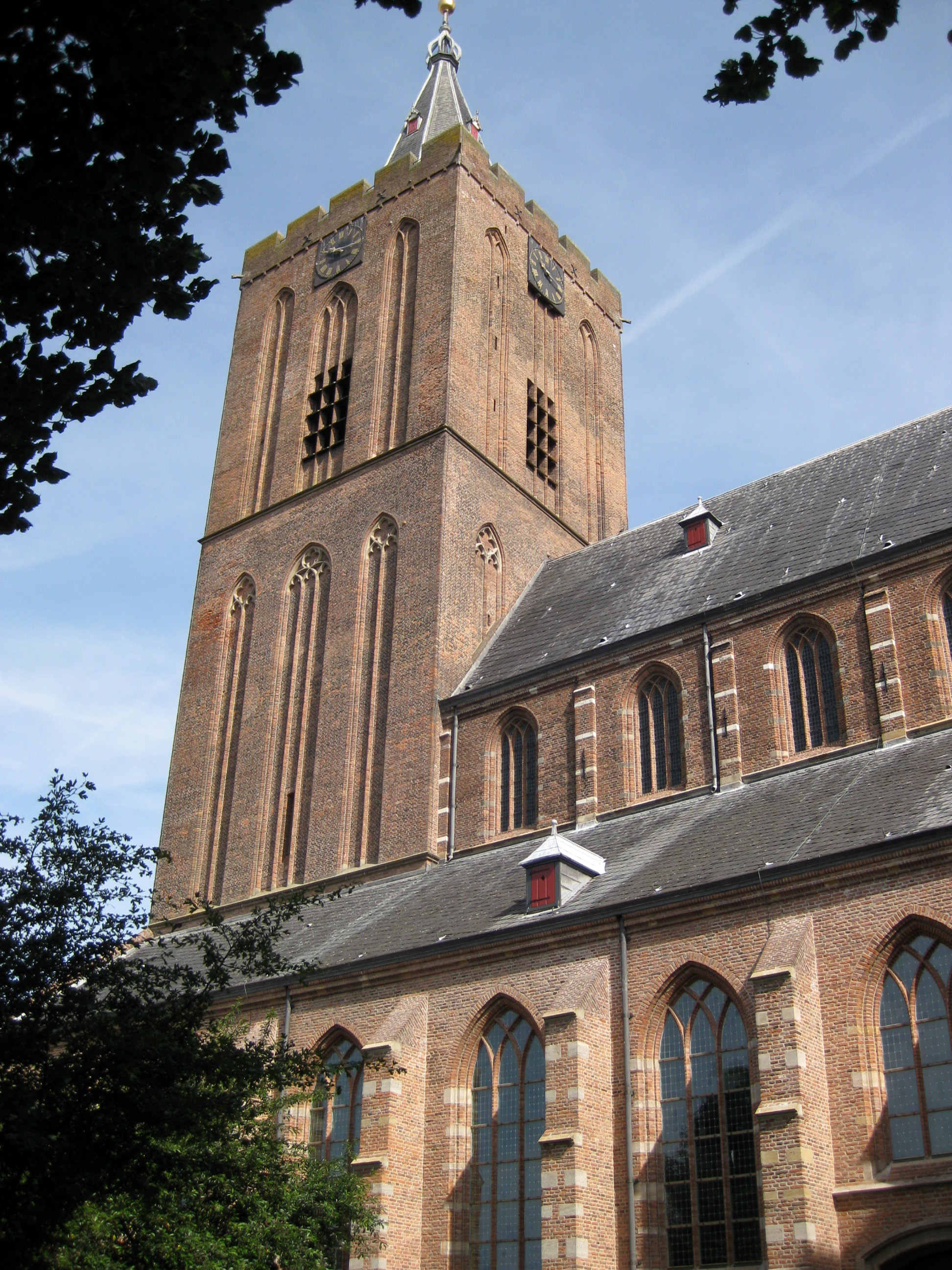 20100622 Naarden Marktstraat 13 010.JPG, rijksmonument in Naarden-Vesting